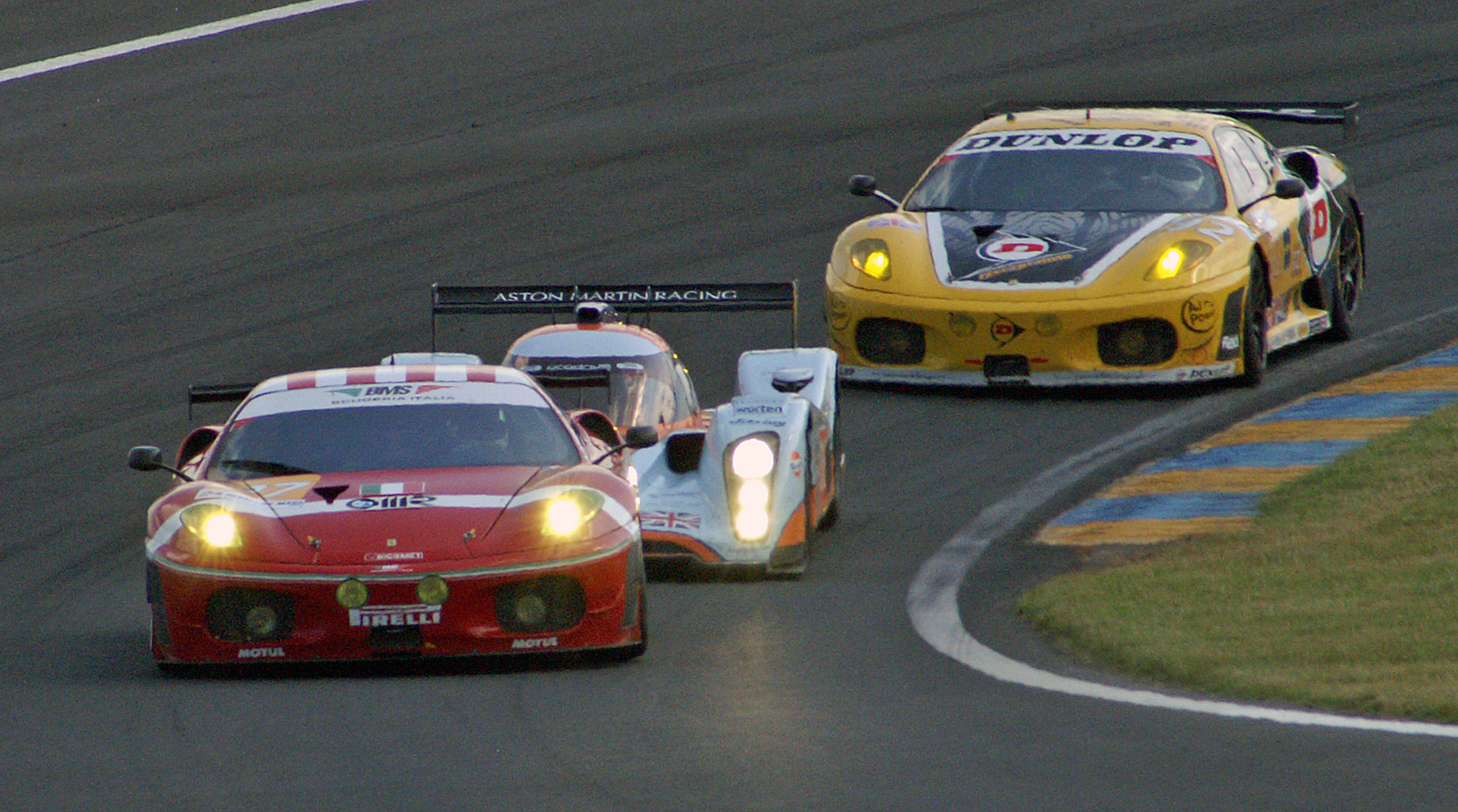 Le Mans 2009